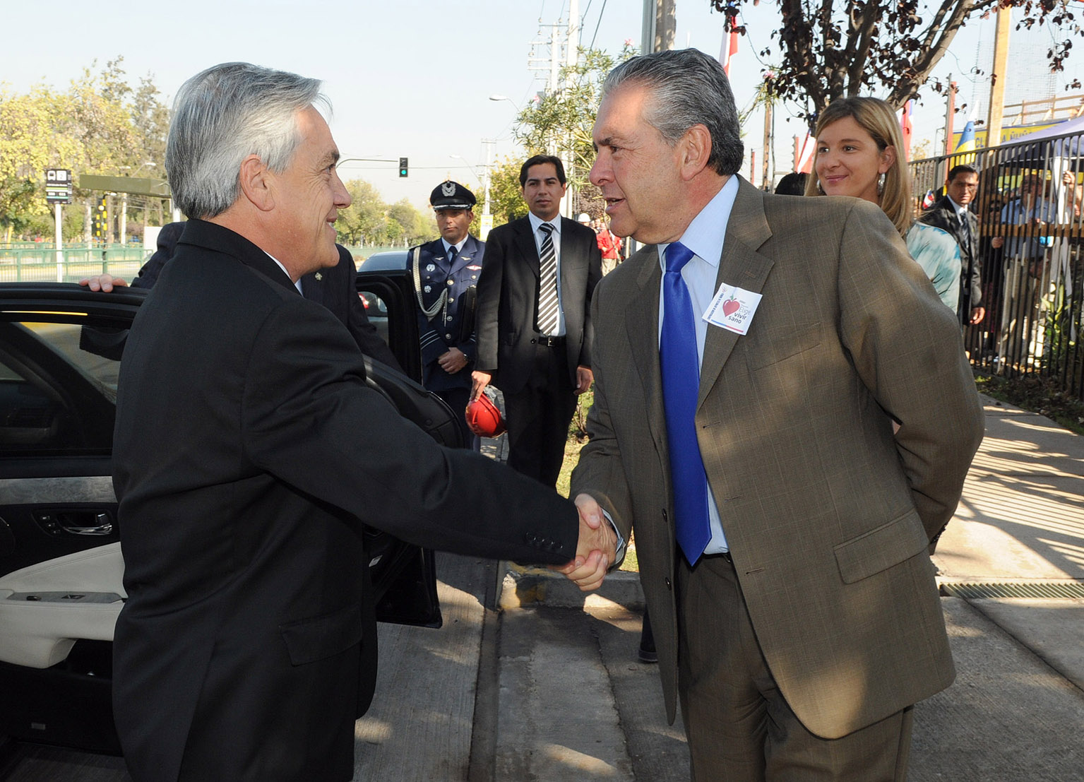 Visita obras de la Clínica Bicentenario de Ñuñoa